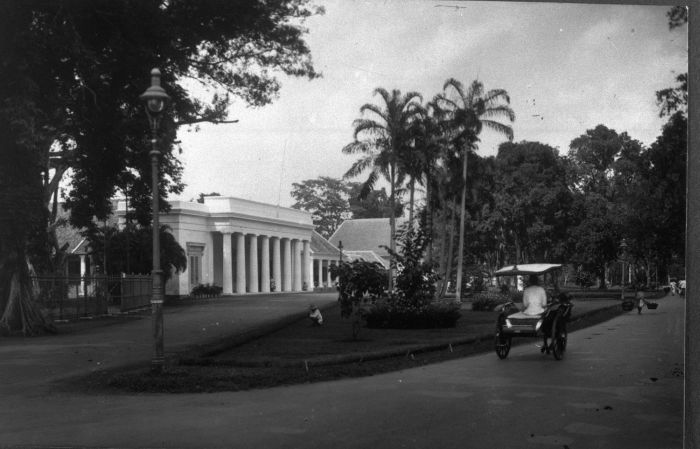 Foto. Dit neoklassieke gebouw van rond 1830 was aanvankelijk de residentie van de legercommandant. Daarna was de Raad van Indië, het adviescollege van de Gouverneur-Generaal, er gevestigd. In 1918 werd het de zetel van de Volksraad. Nu heet het Gedung Pancasila, omdat Soekarno, de eerste President van Indonesië, er in 1945 zijn bekende rede hield over de pancasila, de 'vijf zuilen' van de republiek. Het Hertogspark dankt zijn naam aan Hertog Bernhard van Saksen-Weimar-Eisenach, die als legercommandant rond 1850 de bewoner van dit 'paleis' was. (P. Boomgaard, 2001). Het gebouw van de Volksraad te Batavia gelegen in het Hertogspark, tussen het Koningsplein-Oost en Waterlooplein